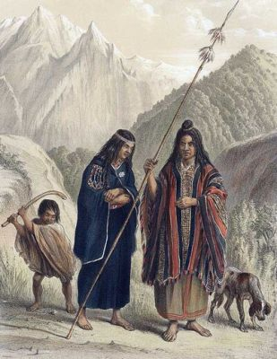 Obra ejecutada por el pintor Claudio Gay durante su estadía en Chile. En la foto el deporte popular practicado por los mapuche junto a sus ropas y telas.